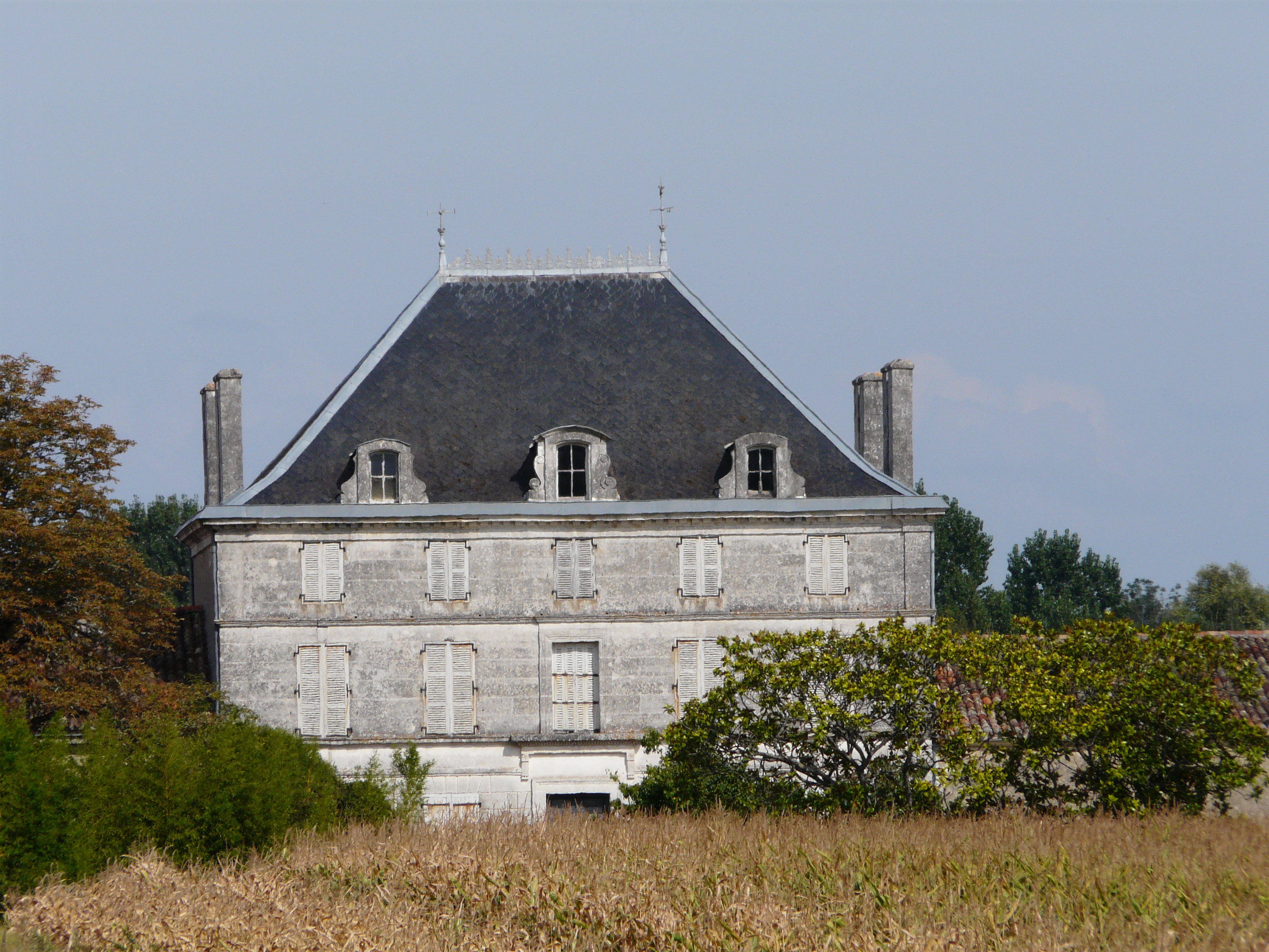 La façade ouest du logis principal du Maine Joli, Vindelle, Charente, France.